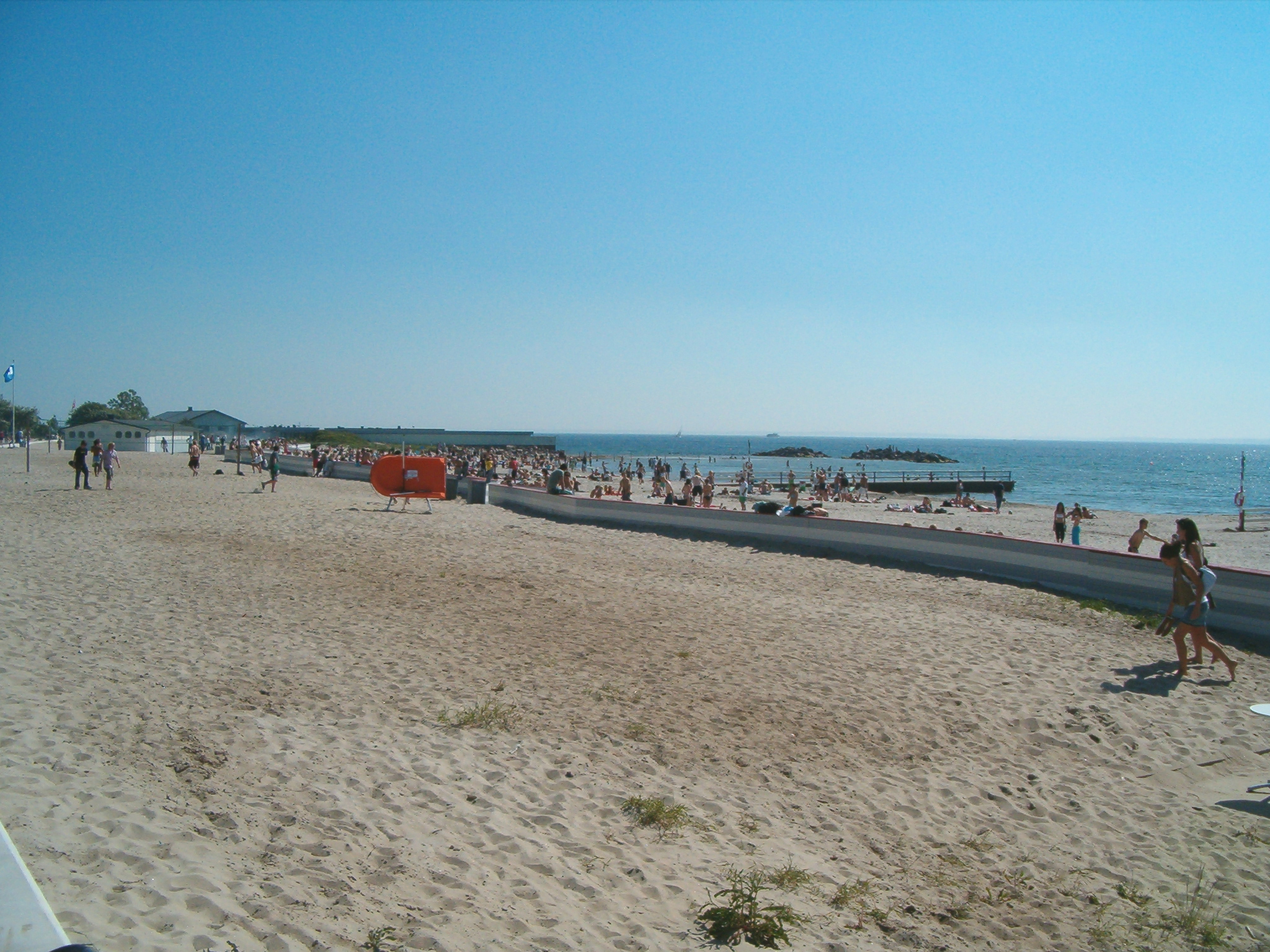 Örestrandsbaden (Fria bad) - beach in Helsingborg, Sweden.